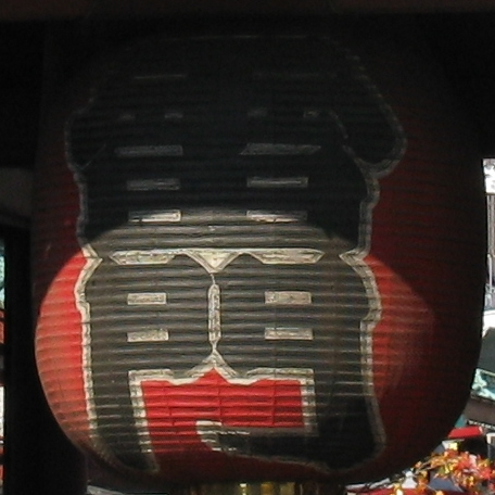 浅草寺の雷門の大提灯